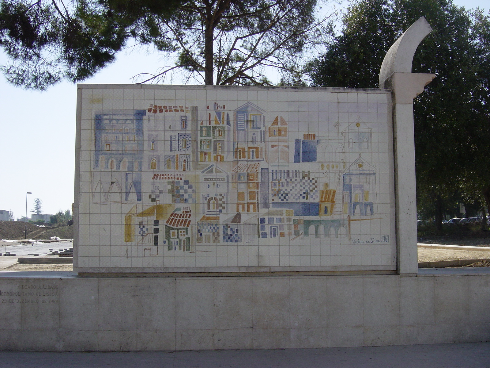 Entrada da estação de metro da Cidade Universitária, em Lisboa; azulejos by Maria Helena Vieira da Silva